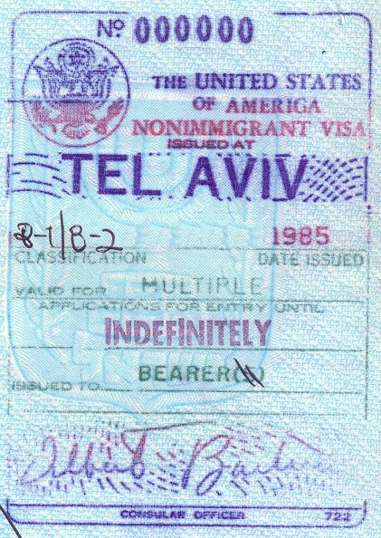 ויזה לארה"ב לכל החיים